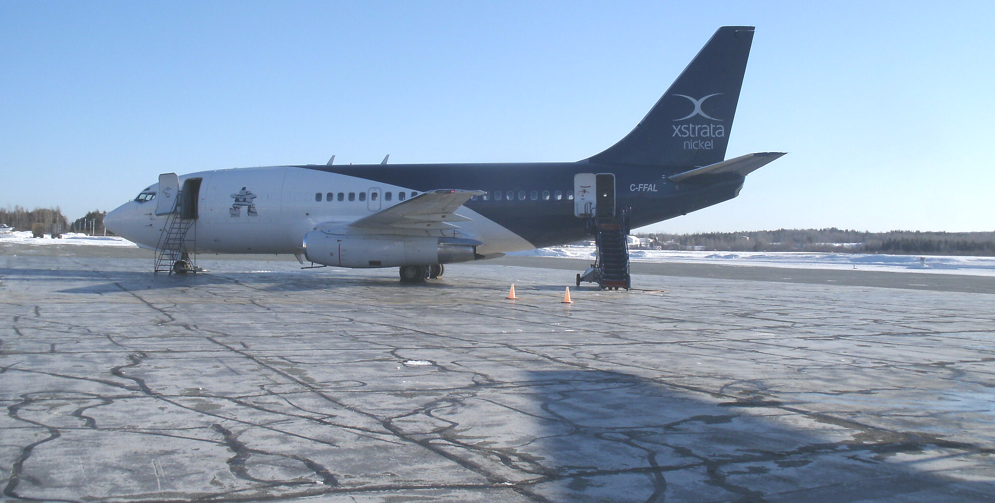 Avion B732 (C-FFAL) appartenant à la compagnie Xstrata à l'aéroport de Rouyn-Noranda